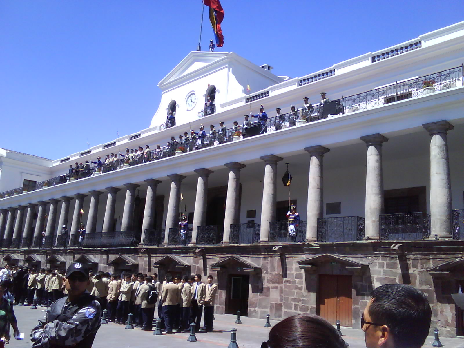 el cambio de guardia en el palacio de carondelet es un evento semanal muy visitado por muchos quiteños y colegio de la ciudad